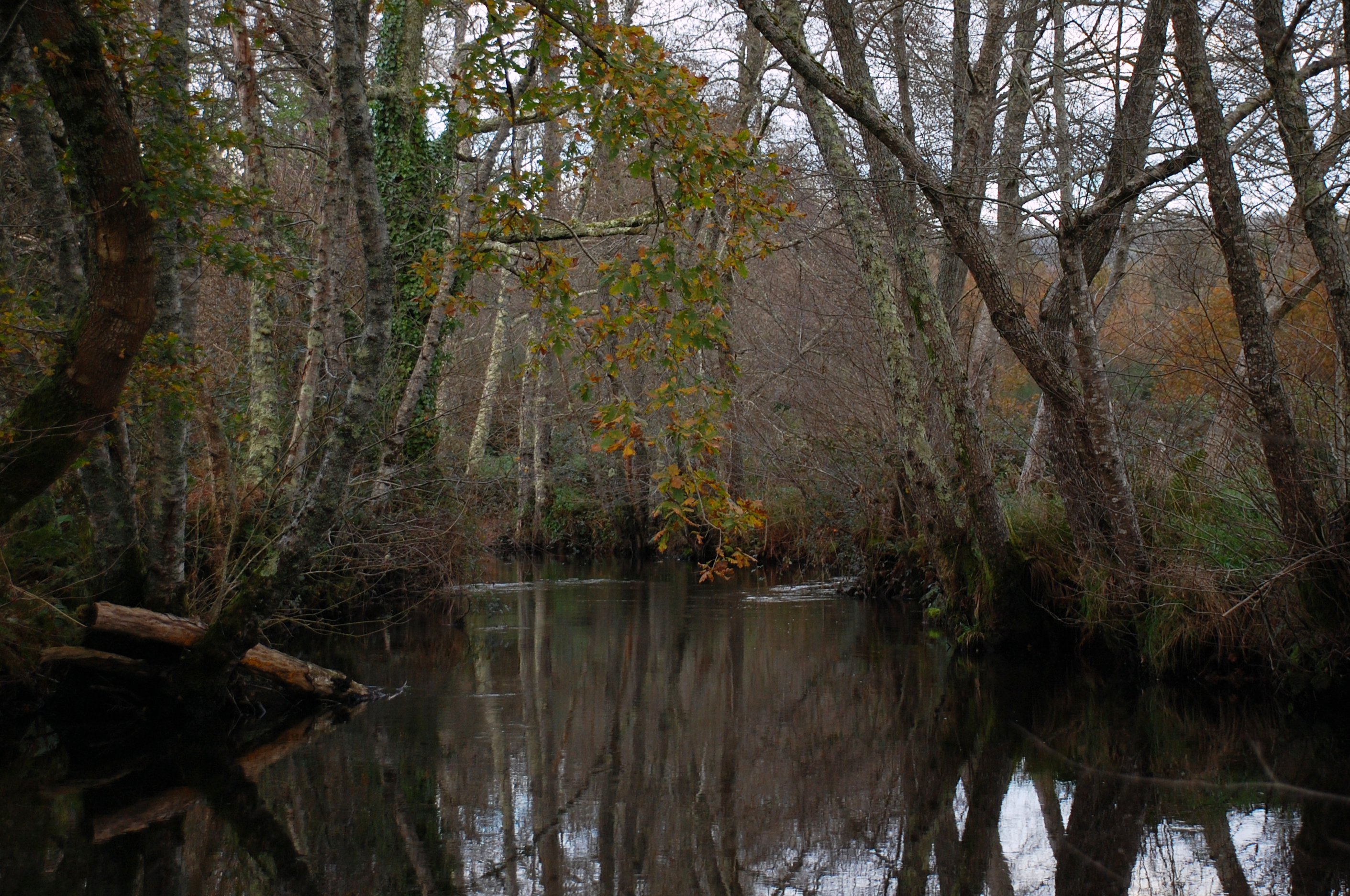 Río Albariña ó seu paso por Cobas, Negreira, preto da súa desembocadura no río Barcala. A foto está tomada dende a ponte de Cobas, mirando contracorrente.